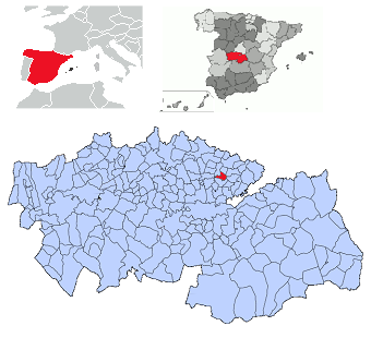 Yuncler en la provincia de Toledo